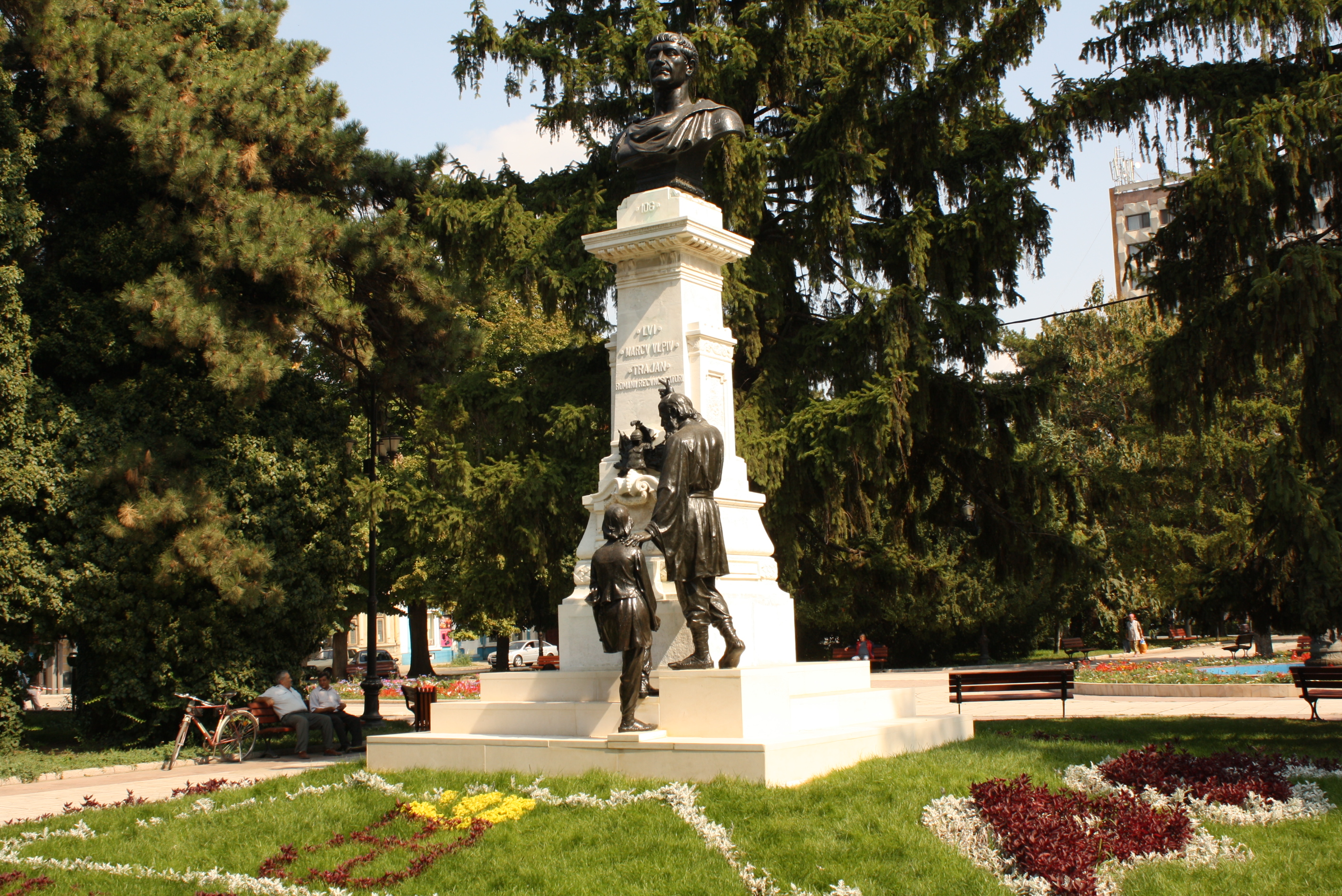 In parc - Grupul statuar " Traian" 1904 -1906